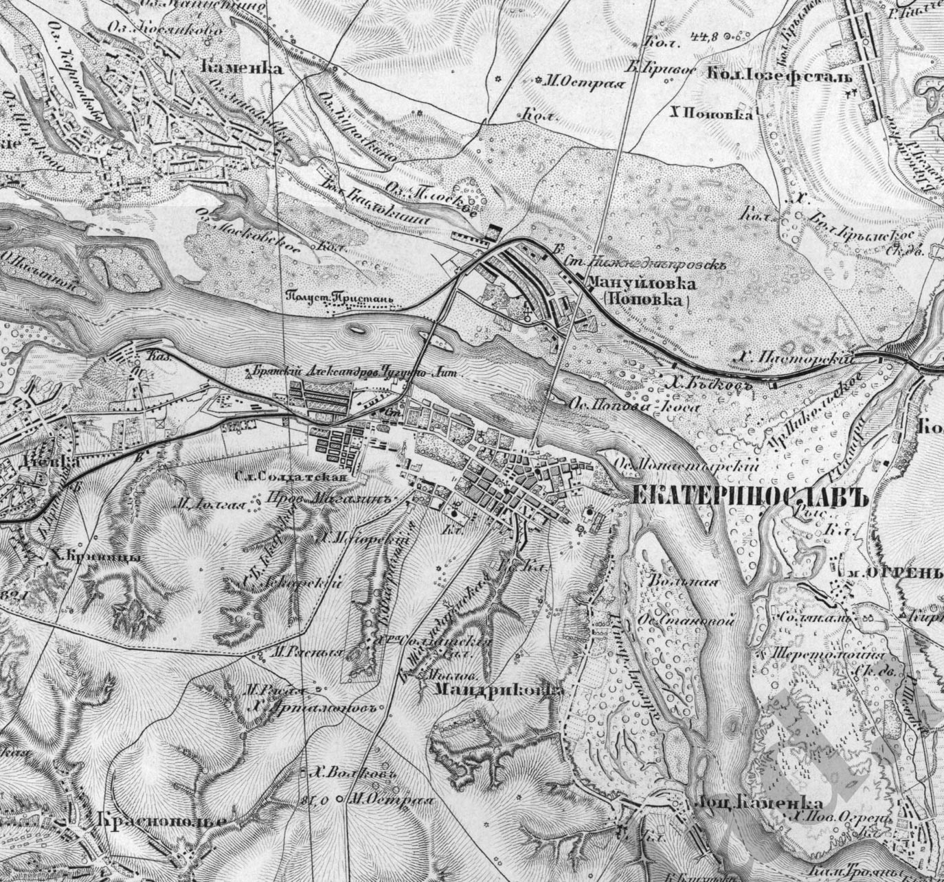 Катеринослав-на-Карті-Шуберта-1860-року: Катеринослав-на-Карті-Шуберта-1860-року